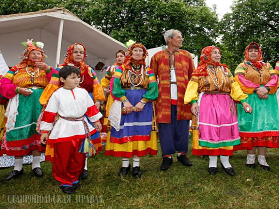 Մոլոկան կանանց հանդերձանքը